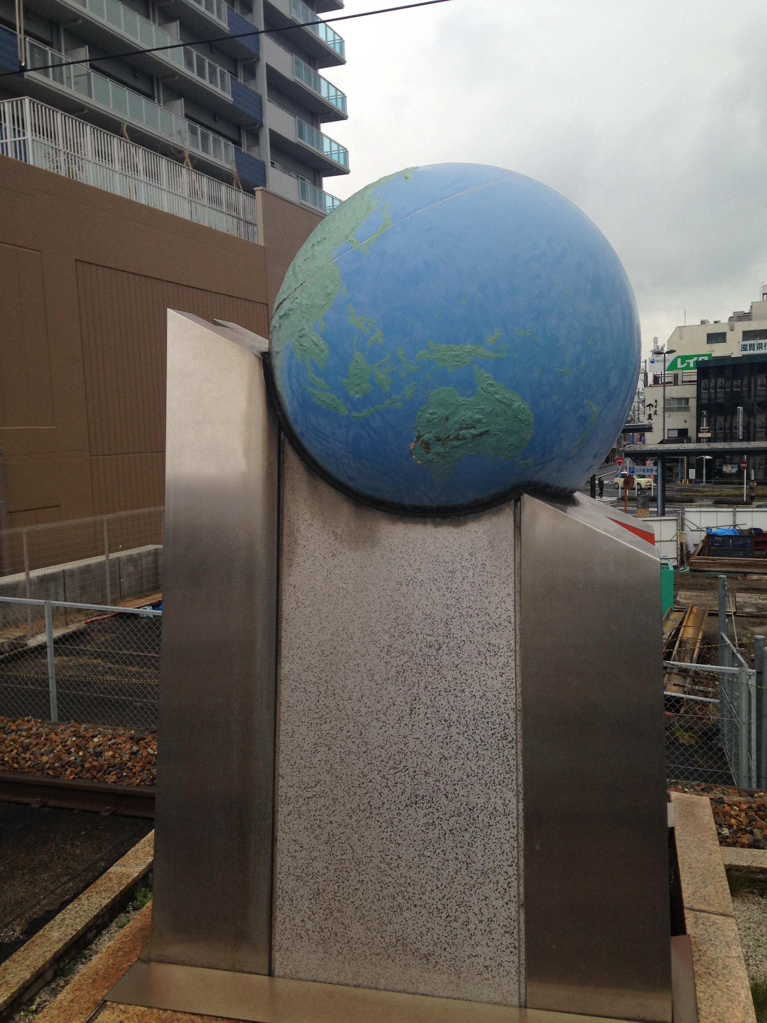 大津駅ホームにある北緯35°モニュメント